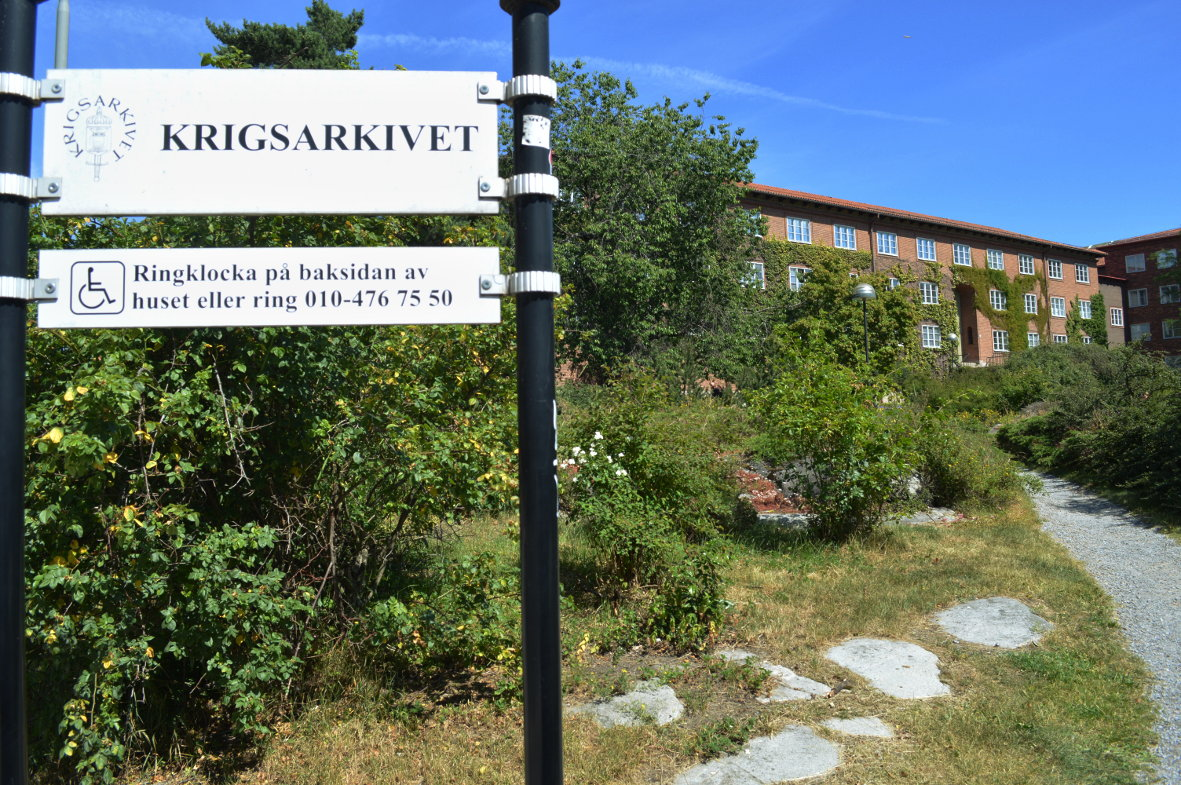 Krigsarkivet på Östermalm i Stockholm.